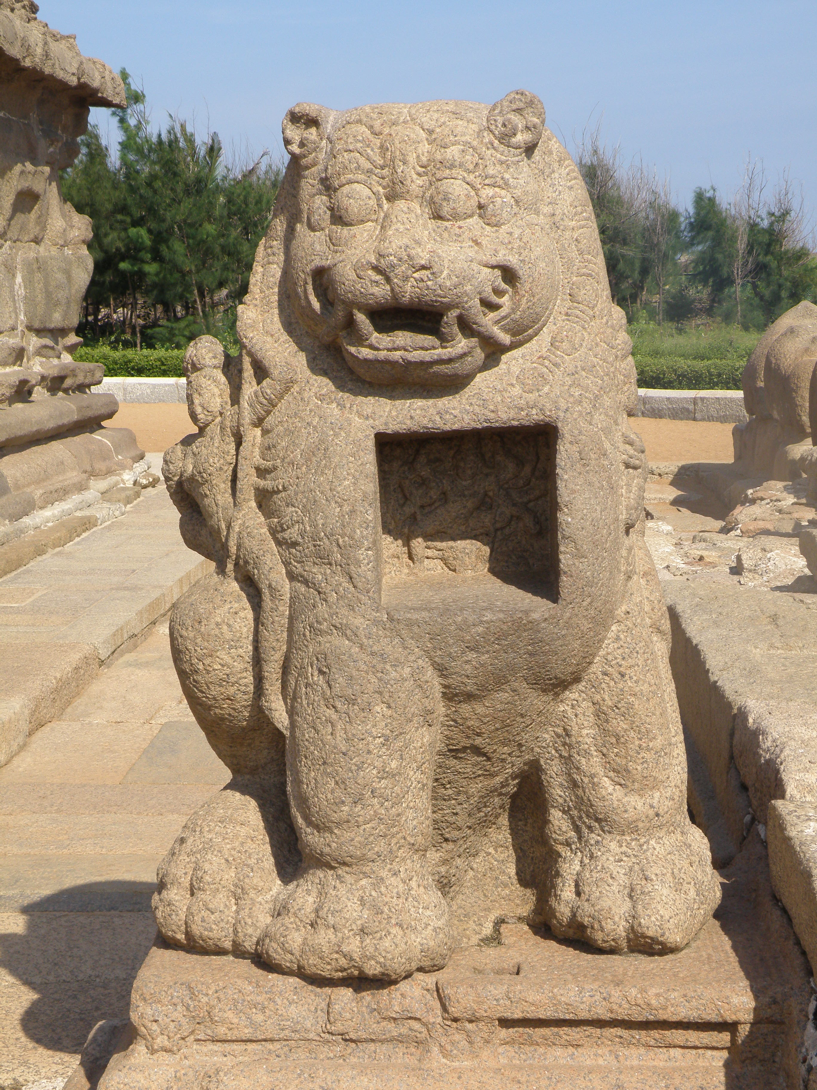 Temple du Rivage - Détail des sculptures - Mahabalipuram - Tamil Nadu - Inde.